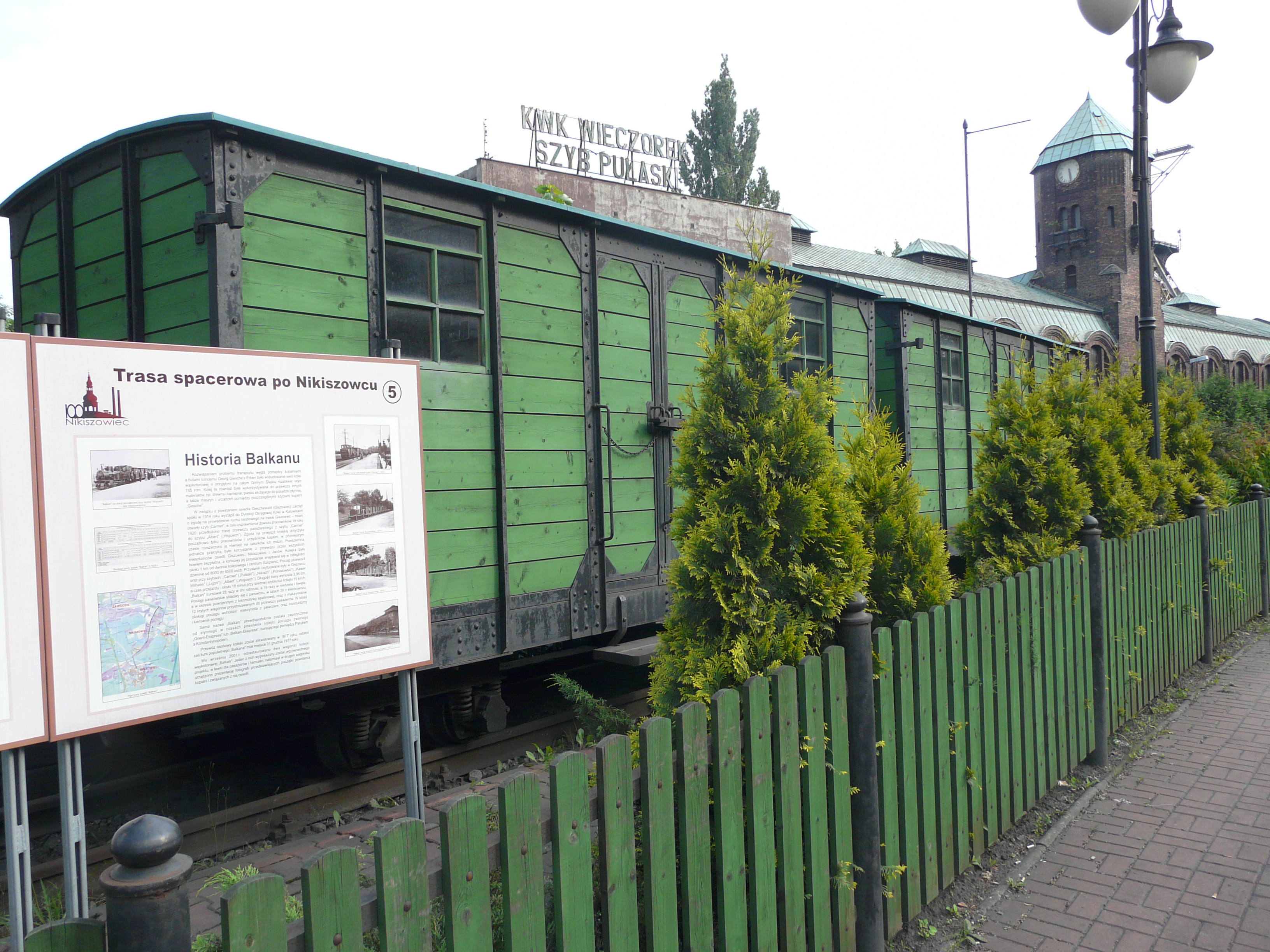 Wieczorek Coal Mine